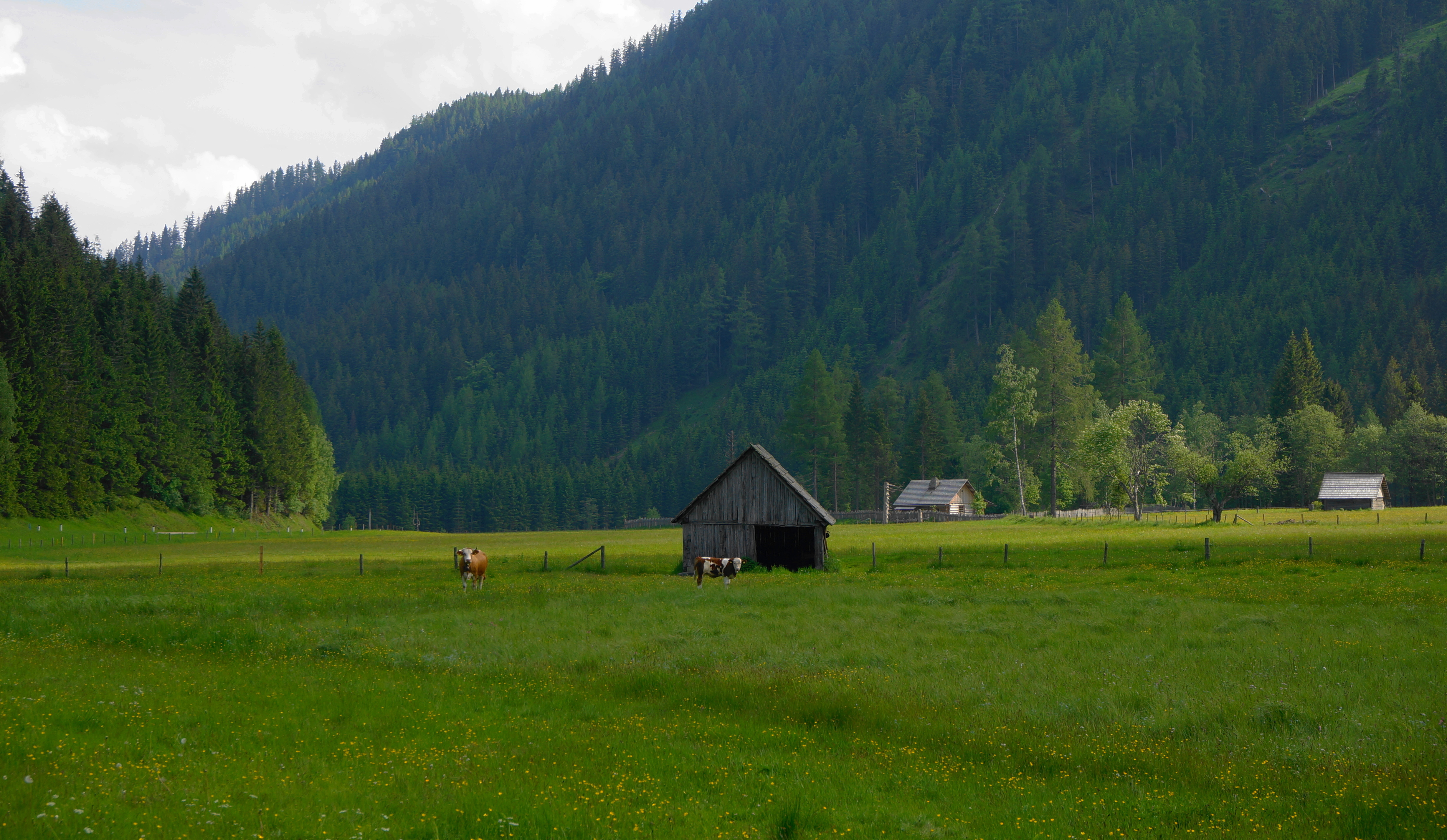 Auenmoos This media shows the nature reserve in Carinthia with the ID NSG.029.